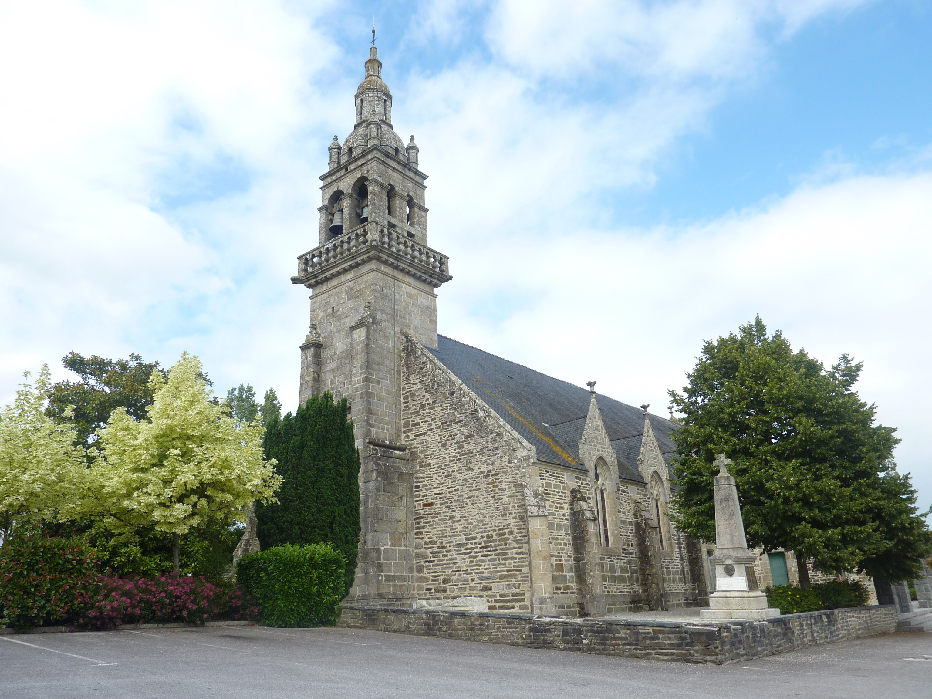 Landeleau : l'église paroissiale 1